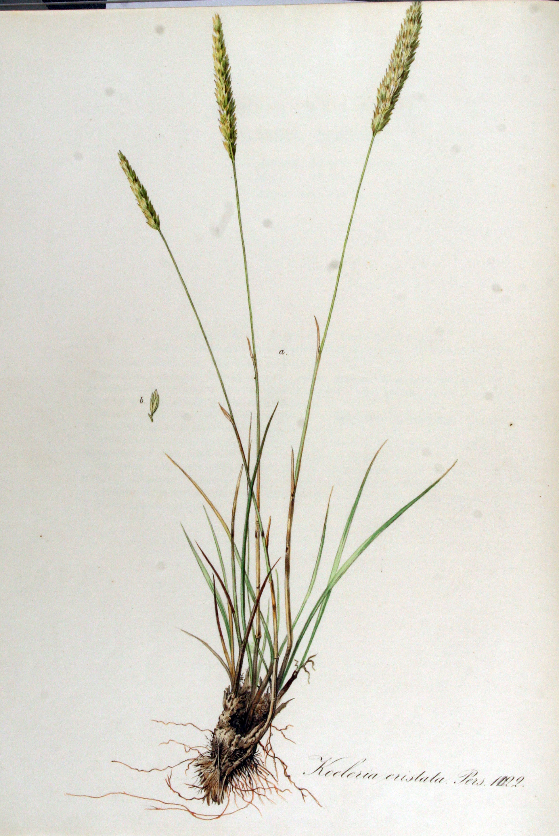 Koeleria pyramidata (Lam.) Beauv. (Syn. Koeleria cristata Pers.)